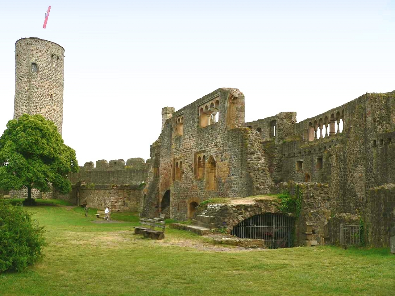 Burgruine Münzenberg - romanischer Palas, Hessen, Deutschland